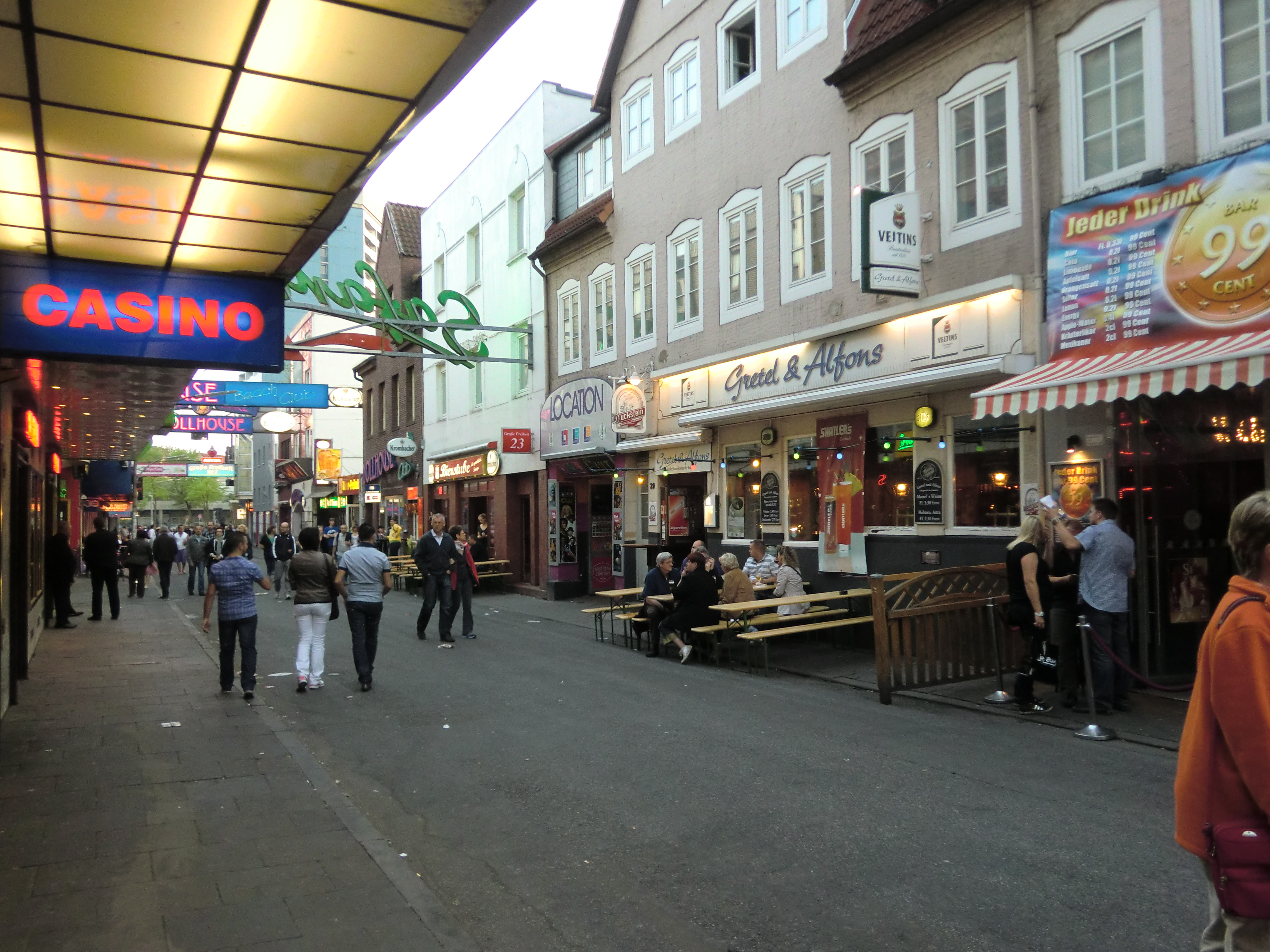 Gretel & Alfons, Große Freiheit 29; Stammkneipe der Musiker vom Star-Club, direkt neben dem Star-Club